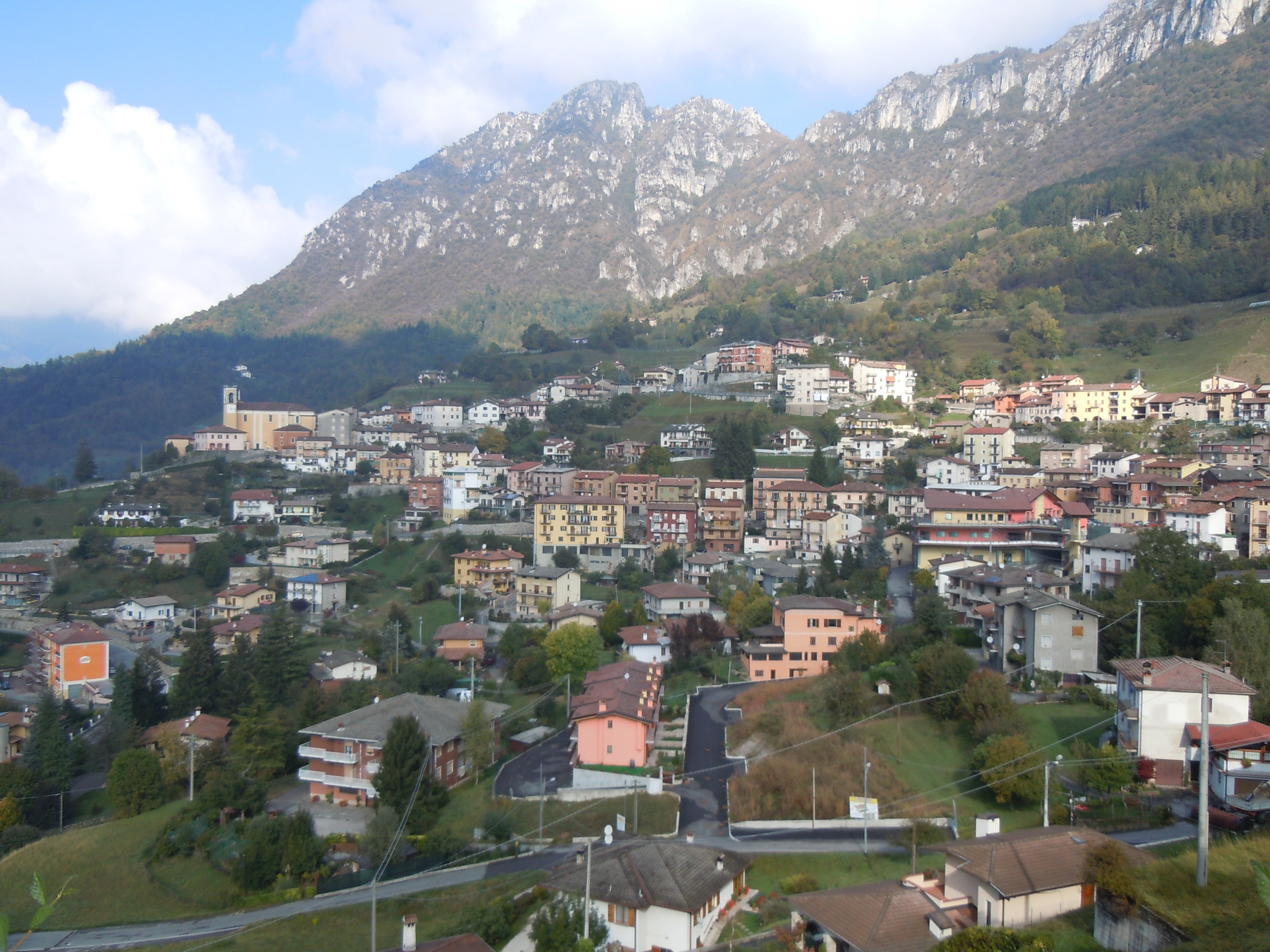 Lodrino, panorama.